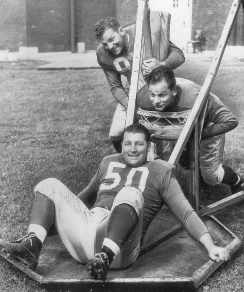 Alex Wojciechowicz Emil Uremovich Szymanski Stan Batinski 1946 Press Photo Lions